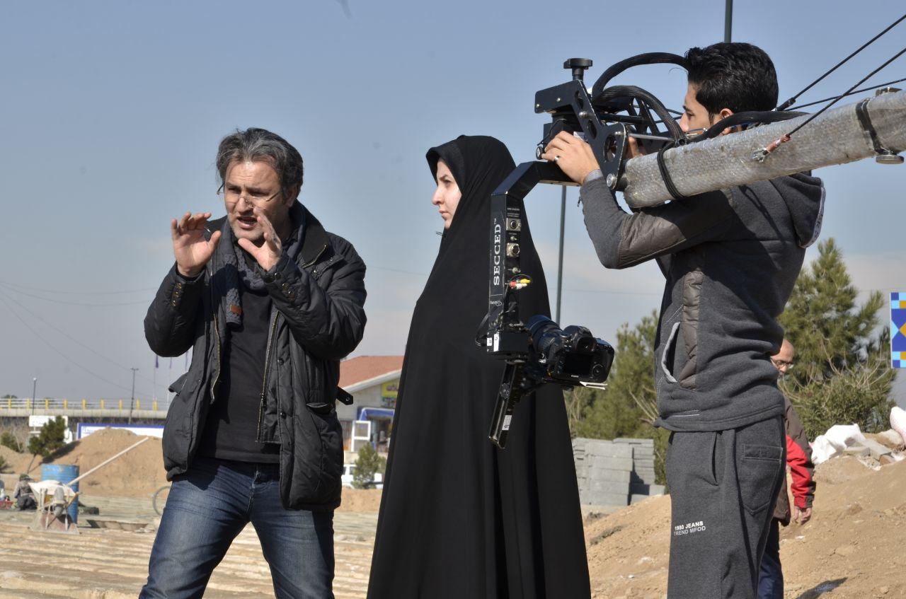 فرود عوض پور